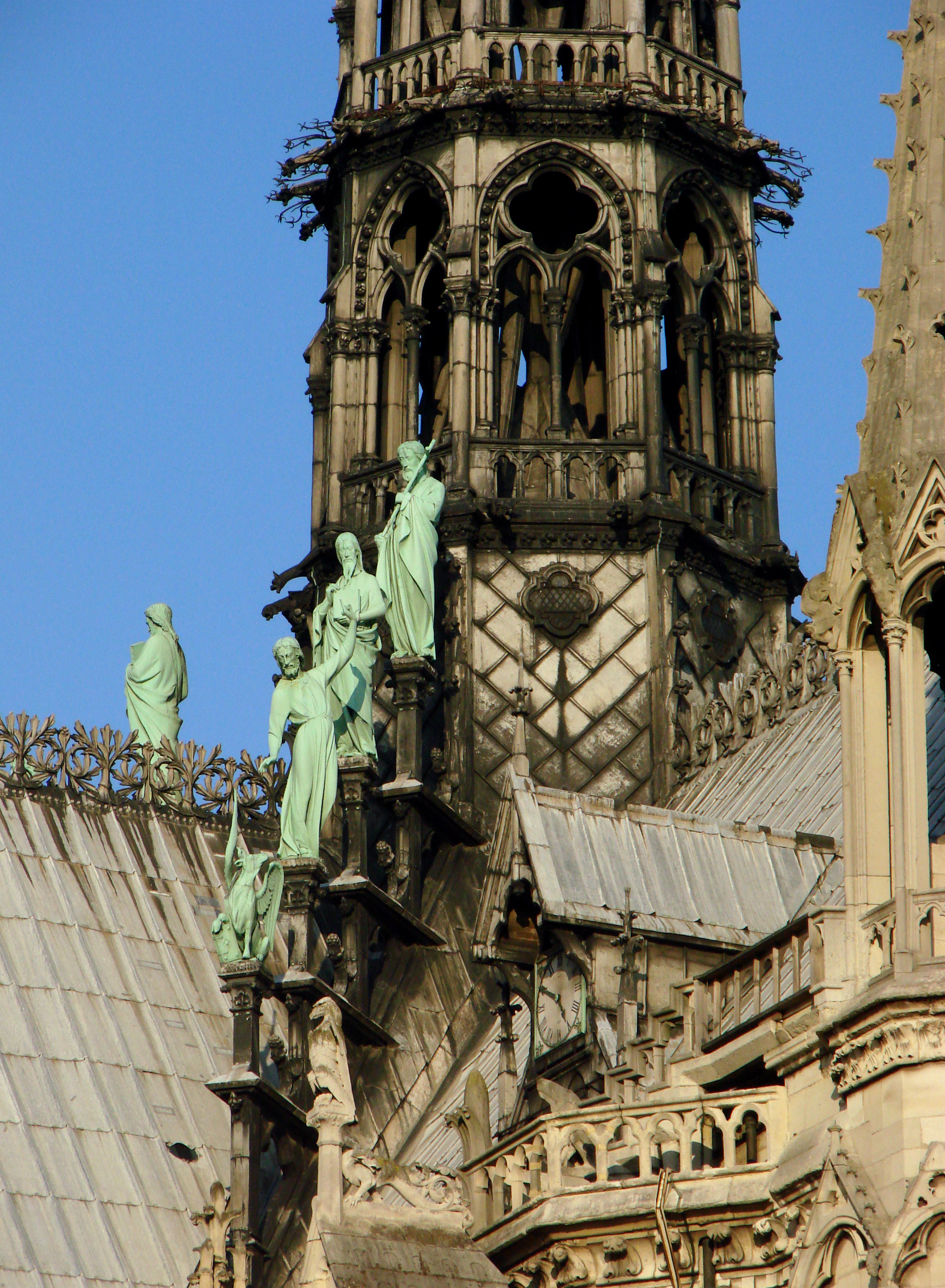 Base de la flèche de la cathédrale Notre-Dame de Paris,réalisée au milieu du 19ème siècle sous la direction de Viollet-le-Duc, avec les statues d'apôtres par Adolphe-Victor Geoffroy-Dechaume.